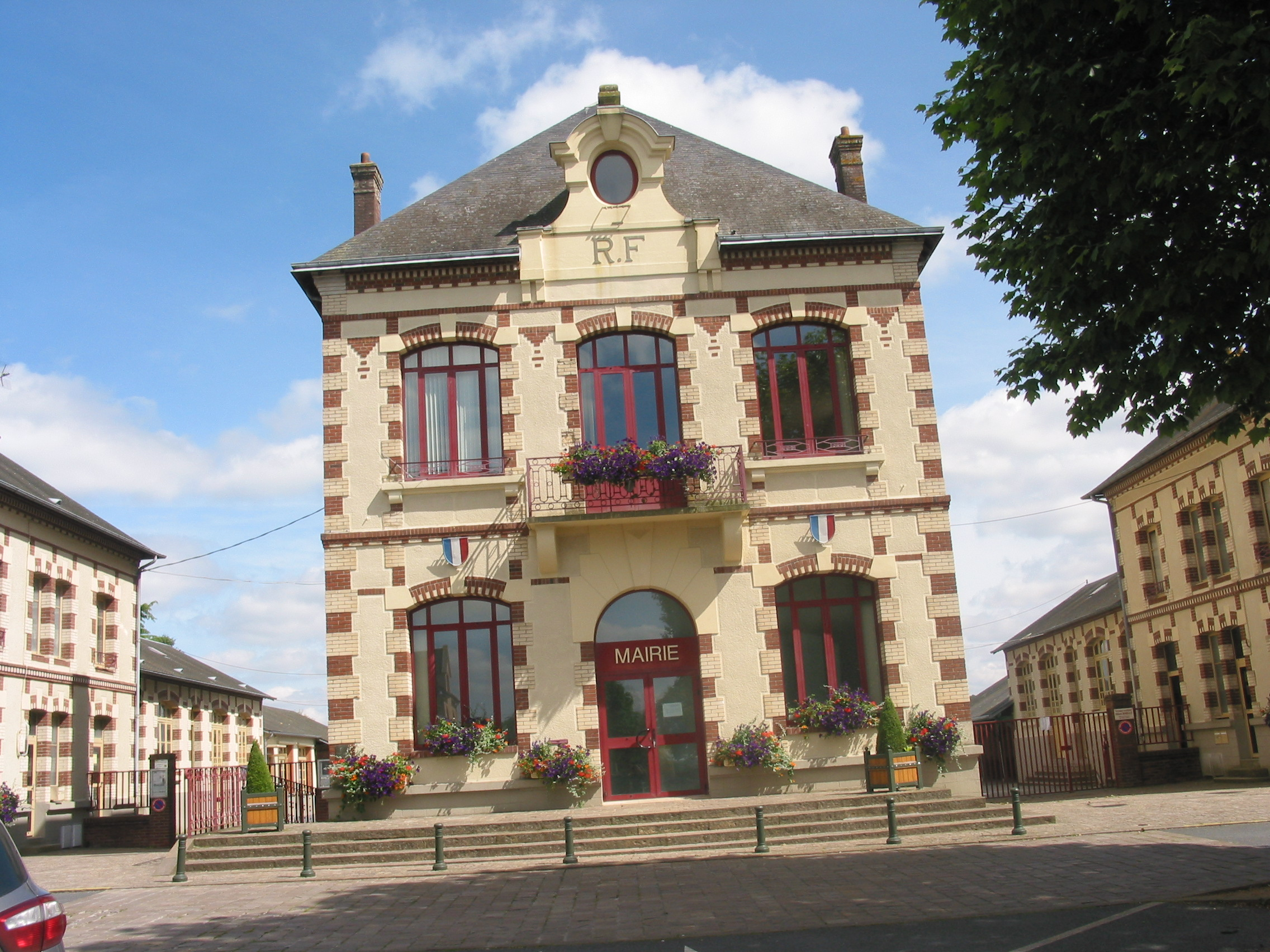 La Mairie